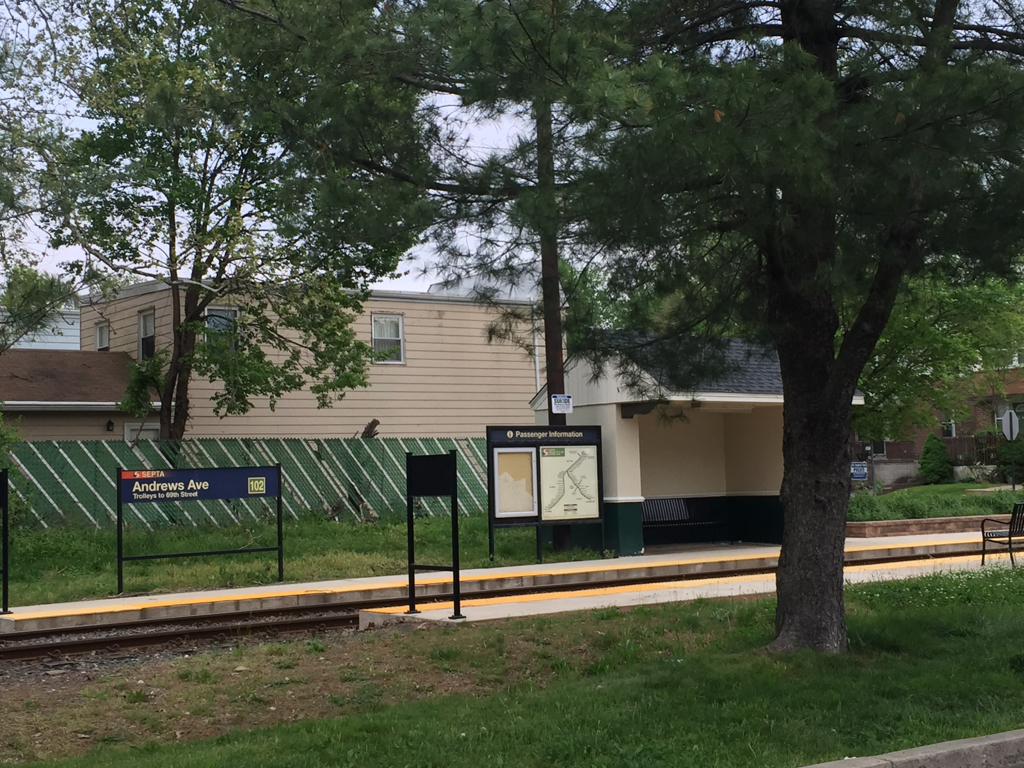 Andrews avenue